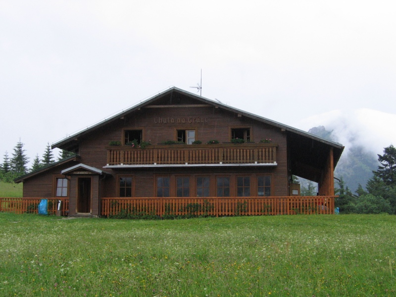 Malá Fatra, Chata na Grúni, Slovensko